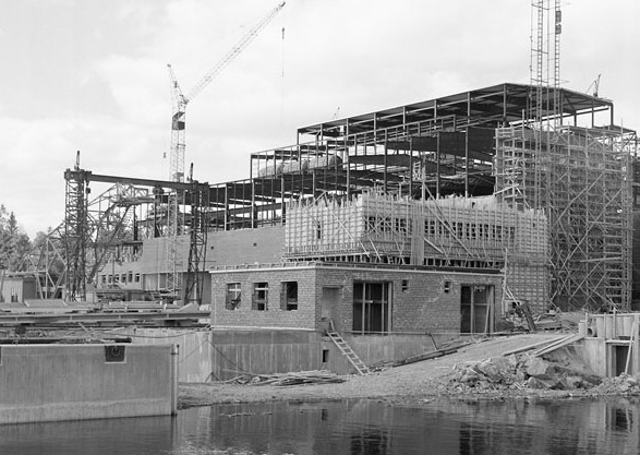 Hässelby Strand. Hässelbyverket uppförs.